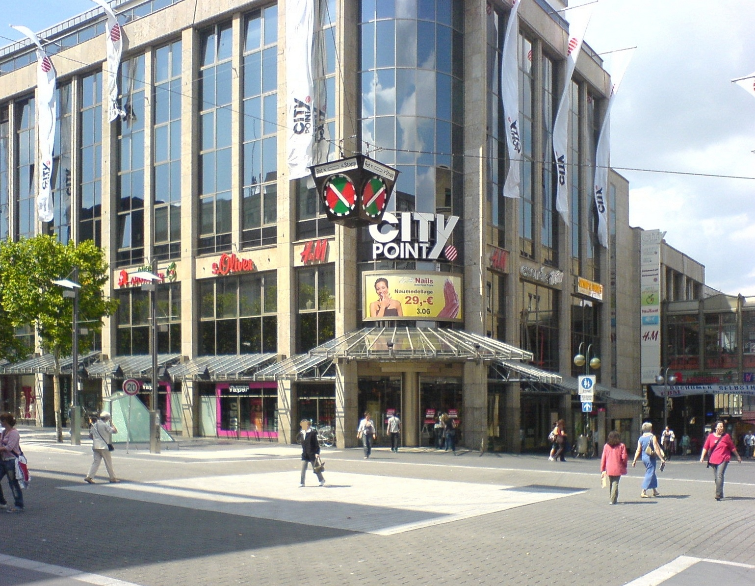 Nachbau einer Heuerampel, Kreuzung Kortumstraße / Bongardstraße in Bochum